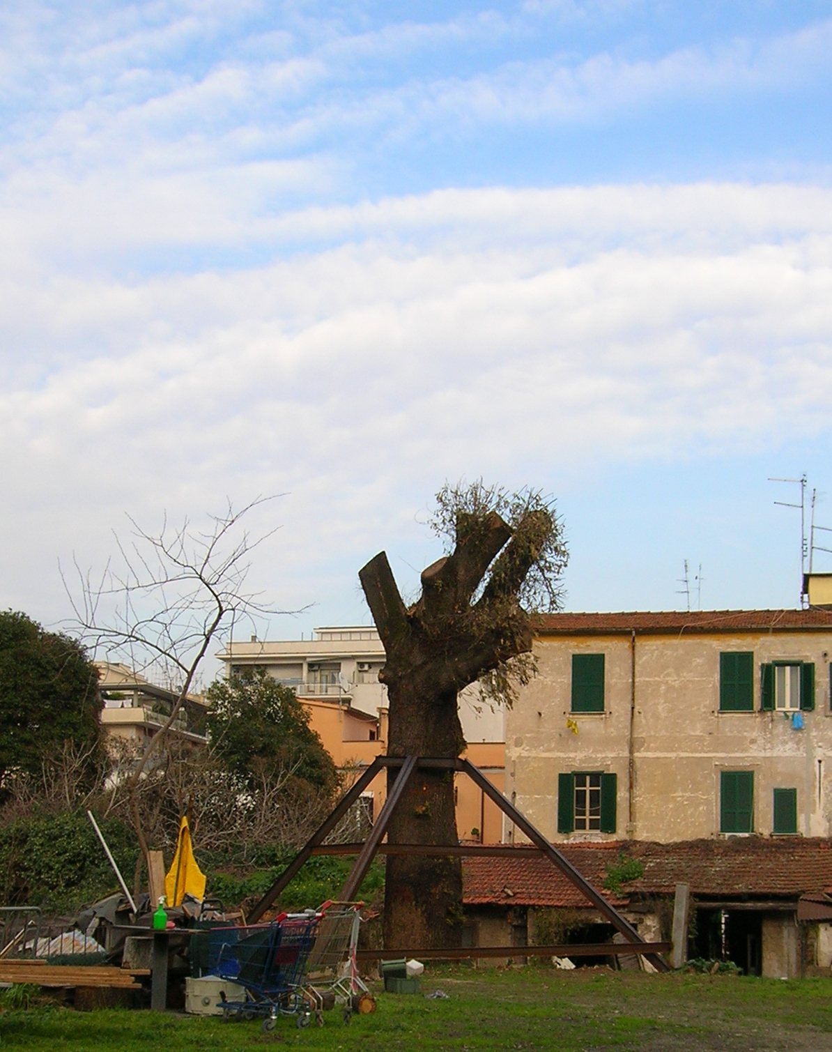 Quercia del Quadraro a via dei Juvenci, la più antica di Roma.